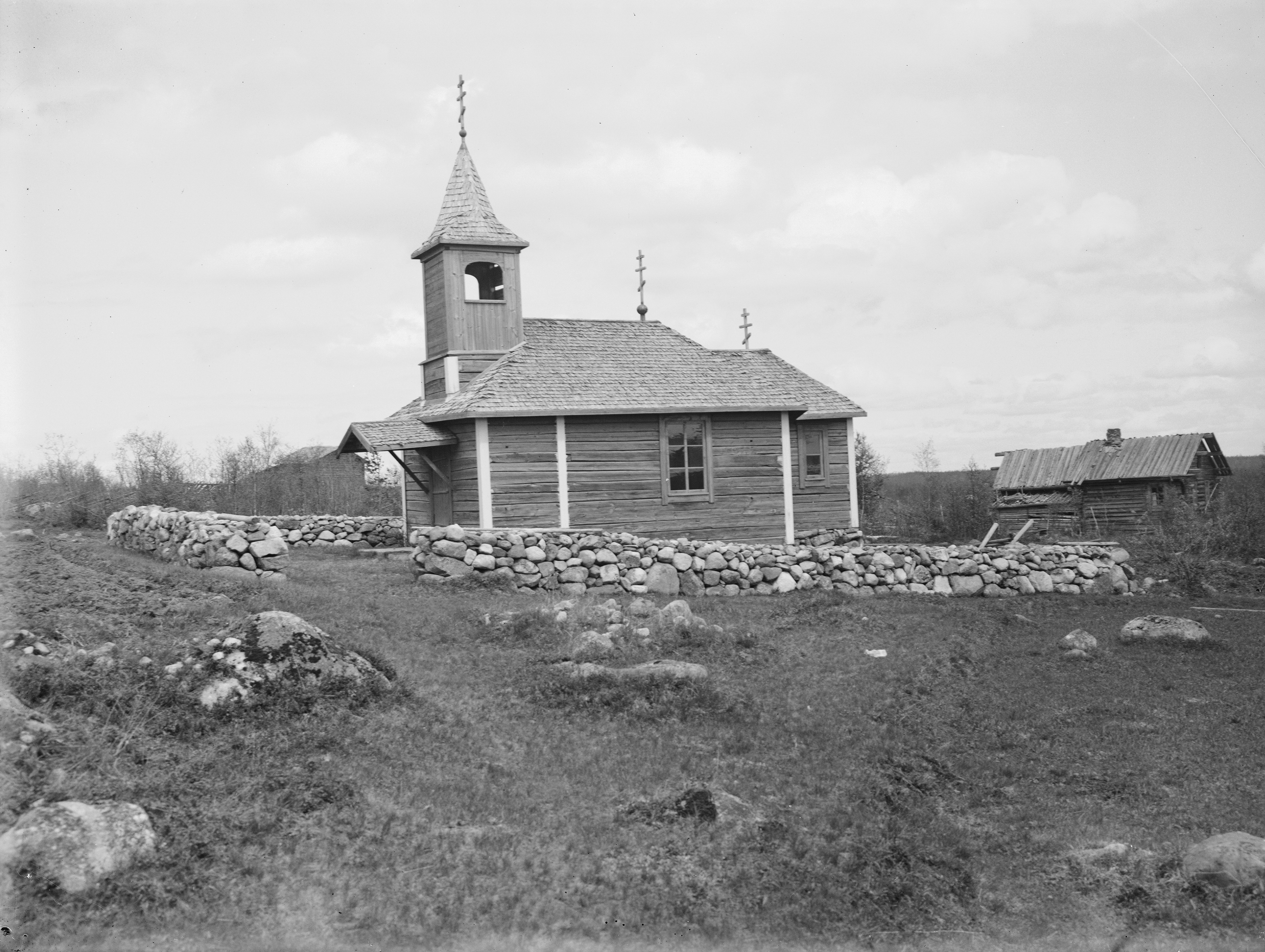 Mustavalkoisessa valokuvassa on Liusvaaran rukoushuone kiviaitoineen ja ympäristöineen.